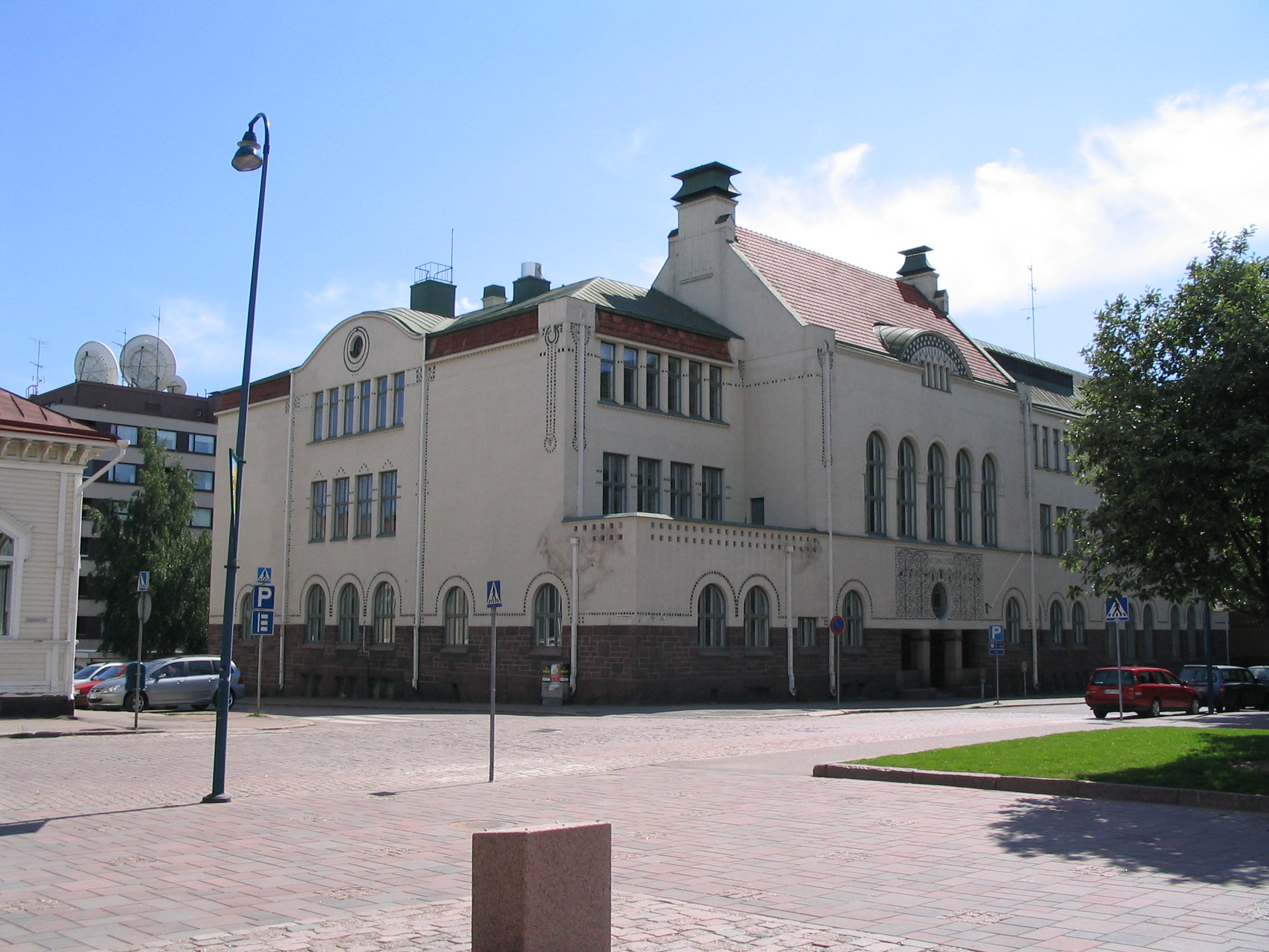 Kotkan Lyseon lukio.